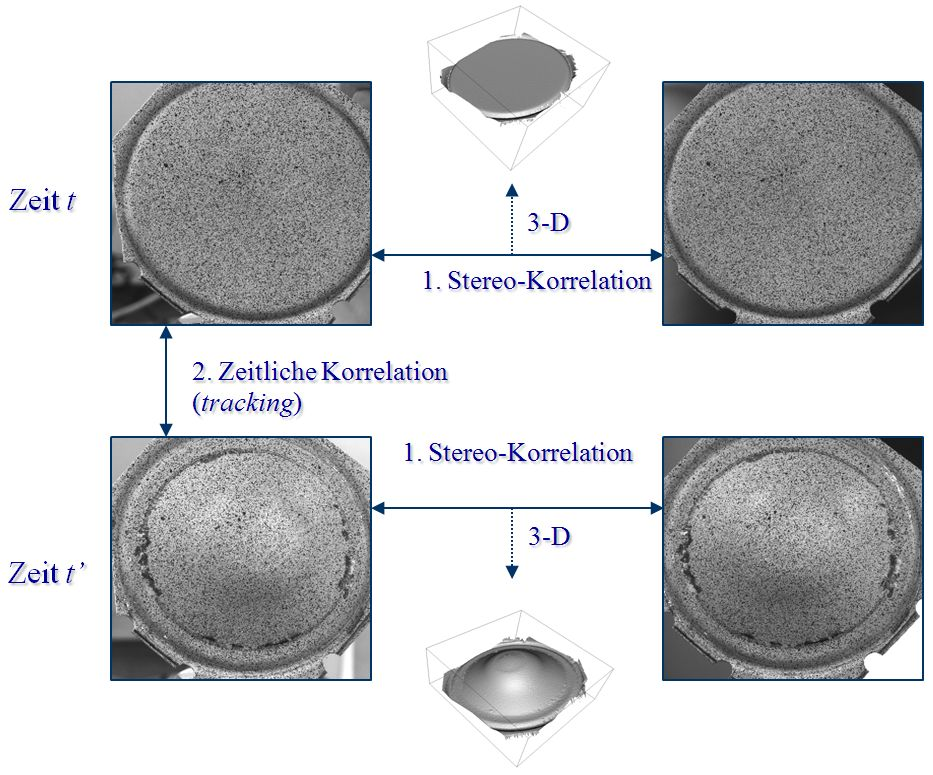 Mehrfache Korrelation für 3D Verformungsmessung